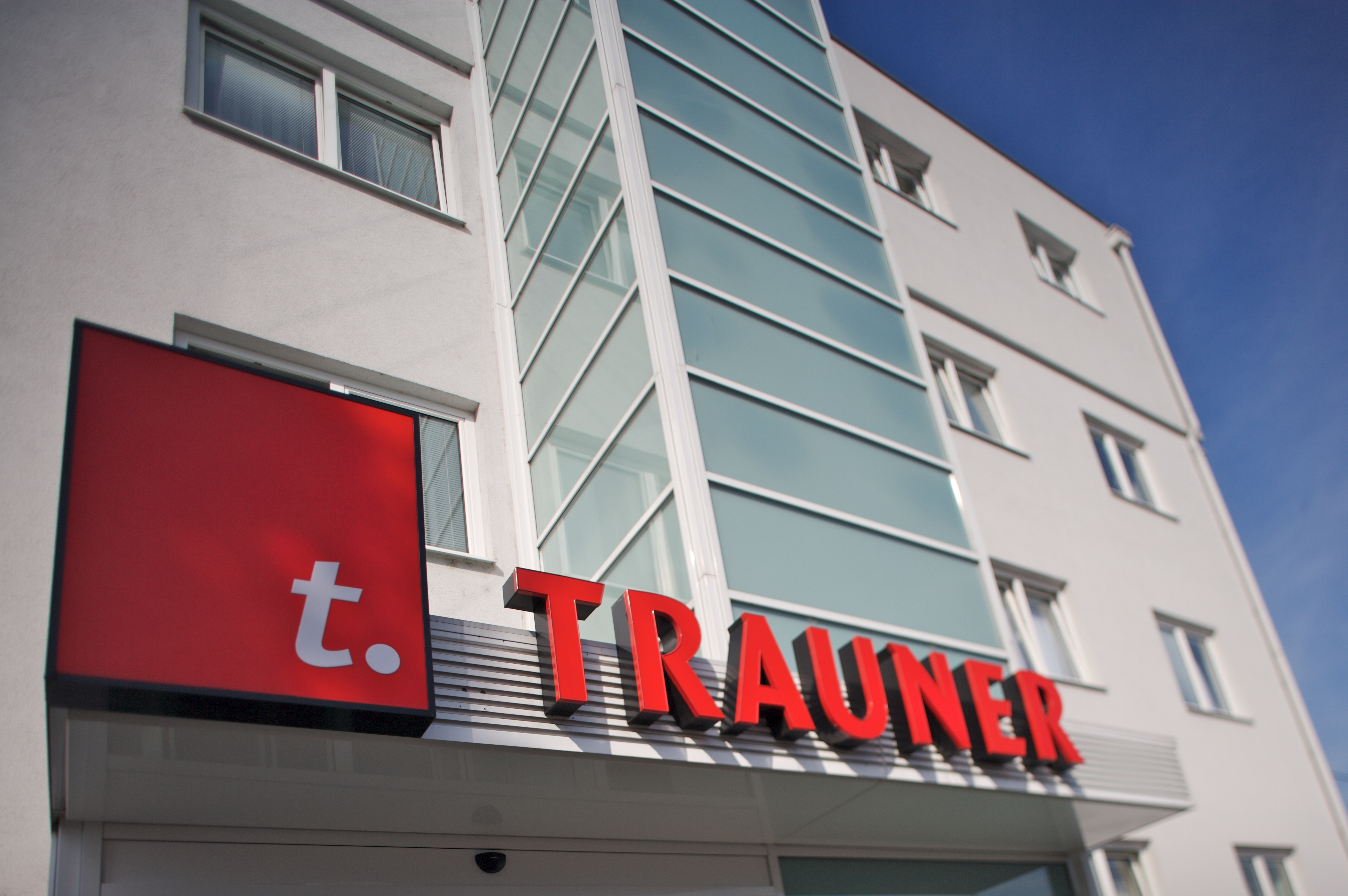 TRAUNER Firmengebäude